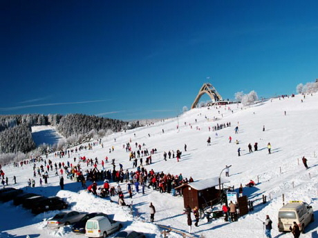 Herrloh, Stadt Winterberg